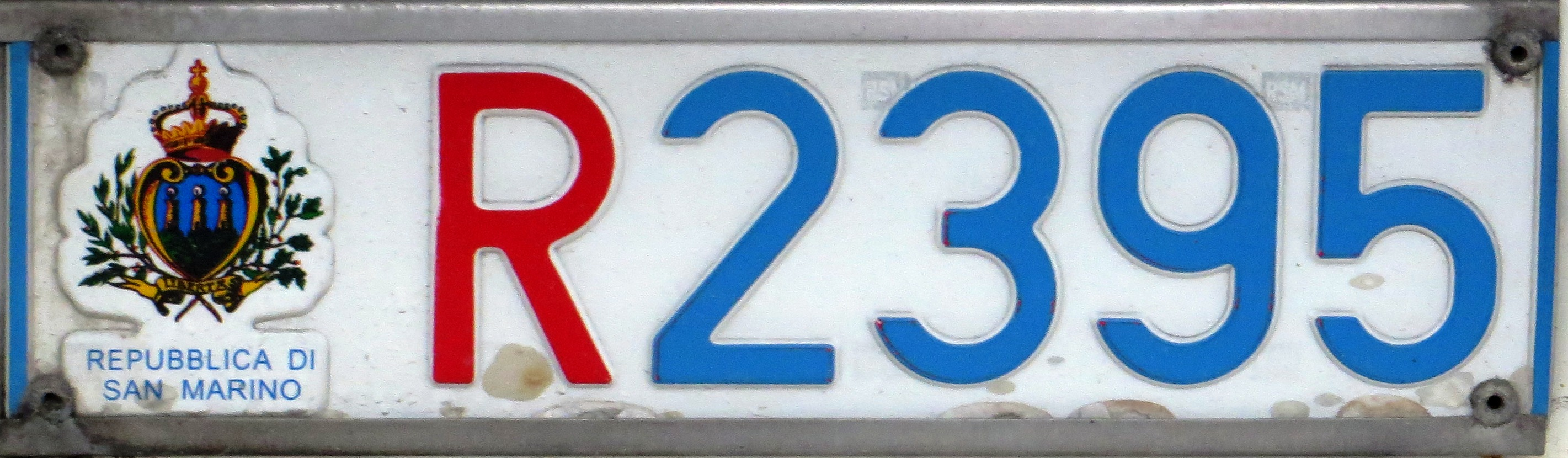 trailer kenteken San Marino